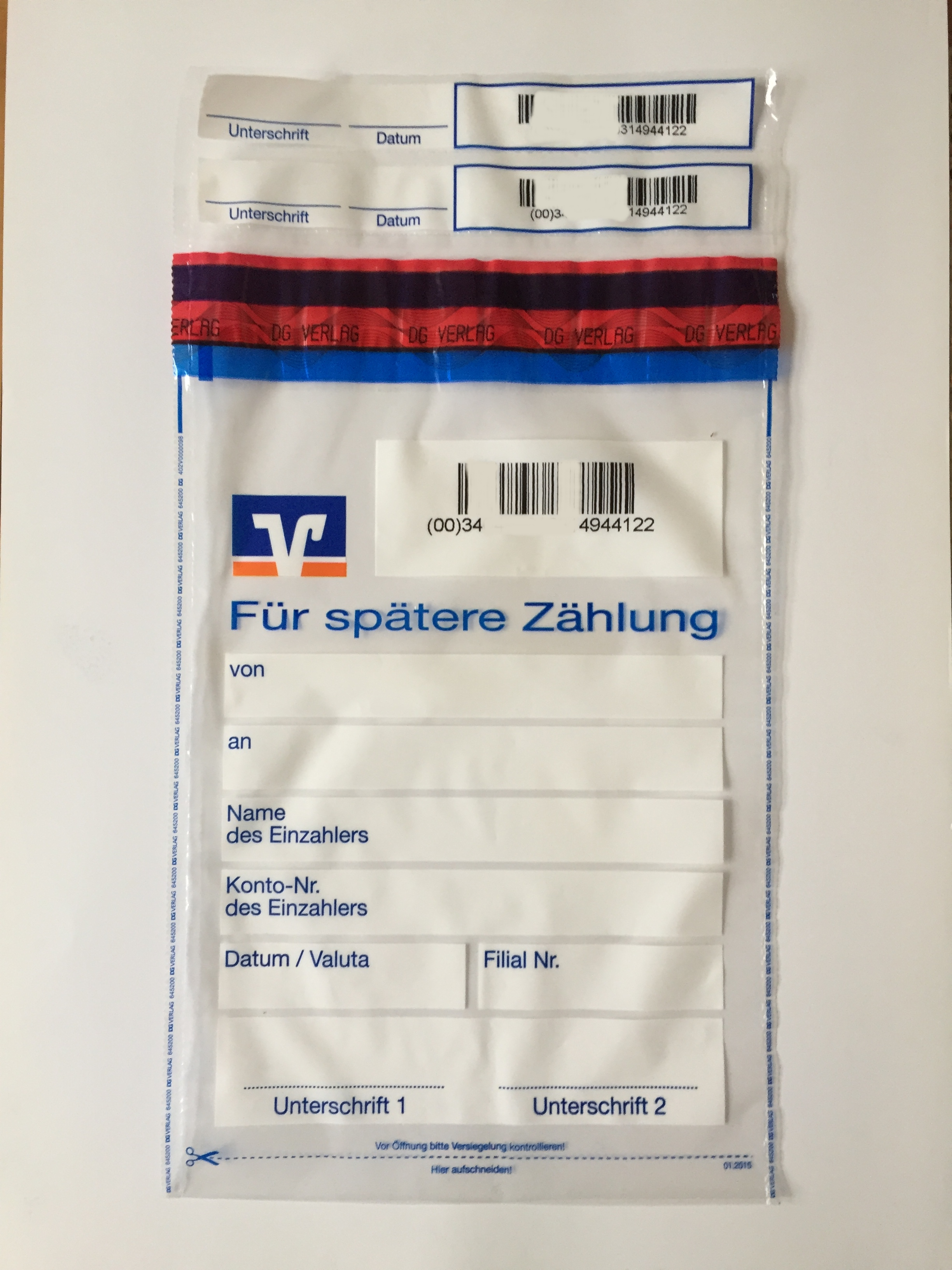 Beutel zur Entgegennahme von Münzgeld